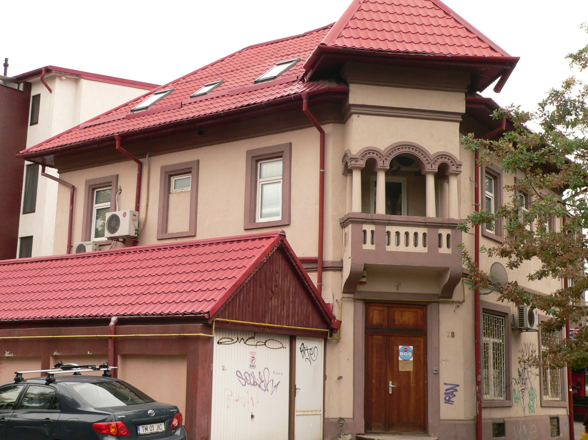 Casă Șos. Panduri nr. 28